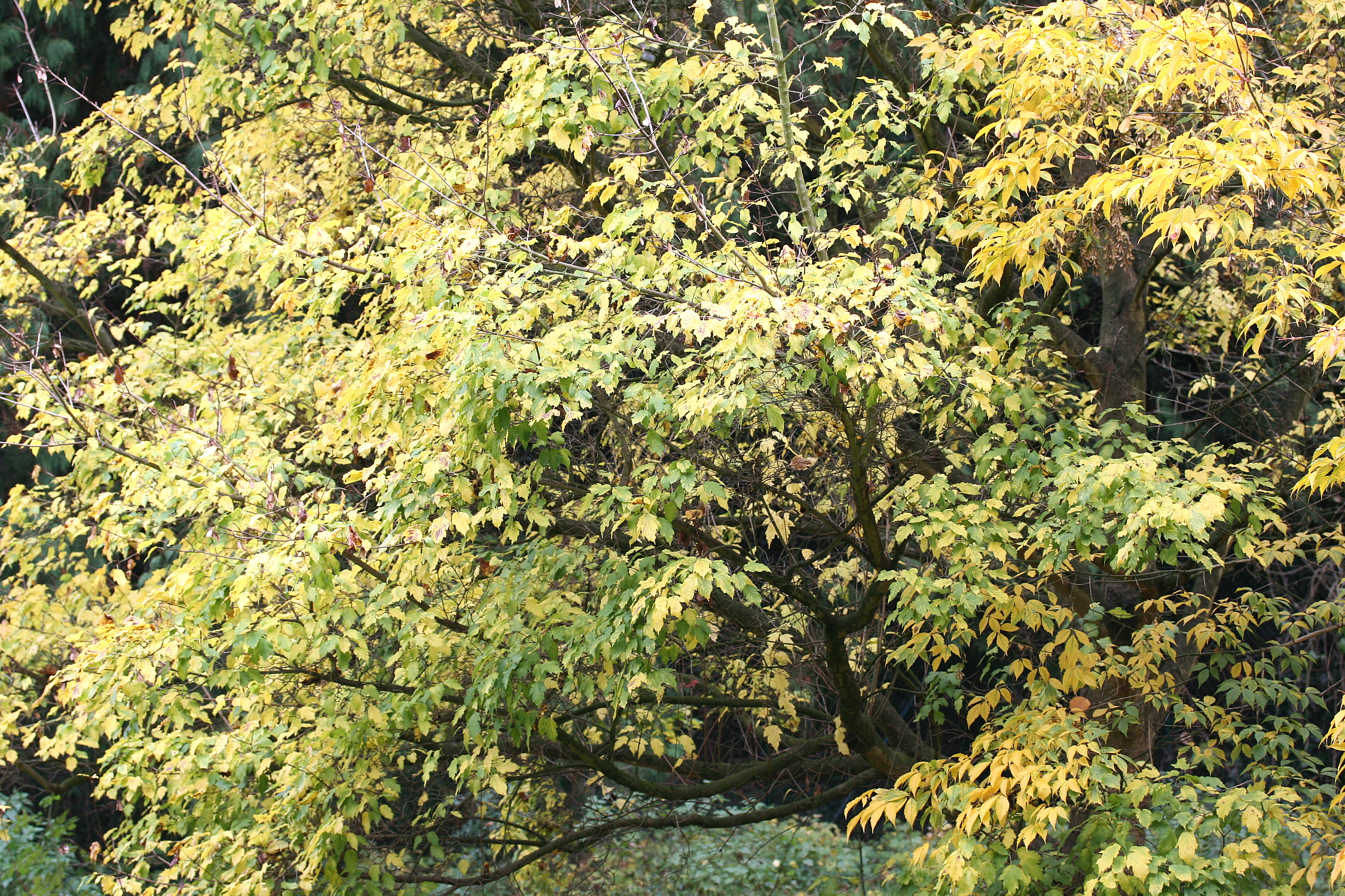 Érable à feuille de bouleau (Acer stachyophyllum) Position exacte : Morlanwelz-Mariemont (Belgique) - Parc du domaine de Mariemont.